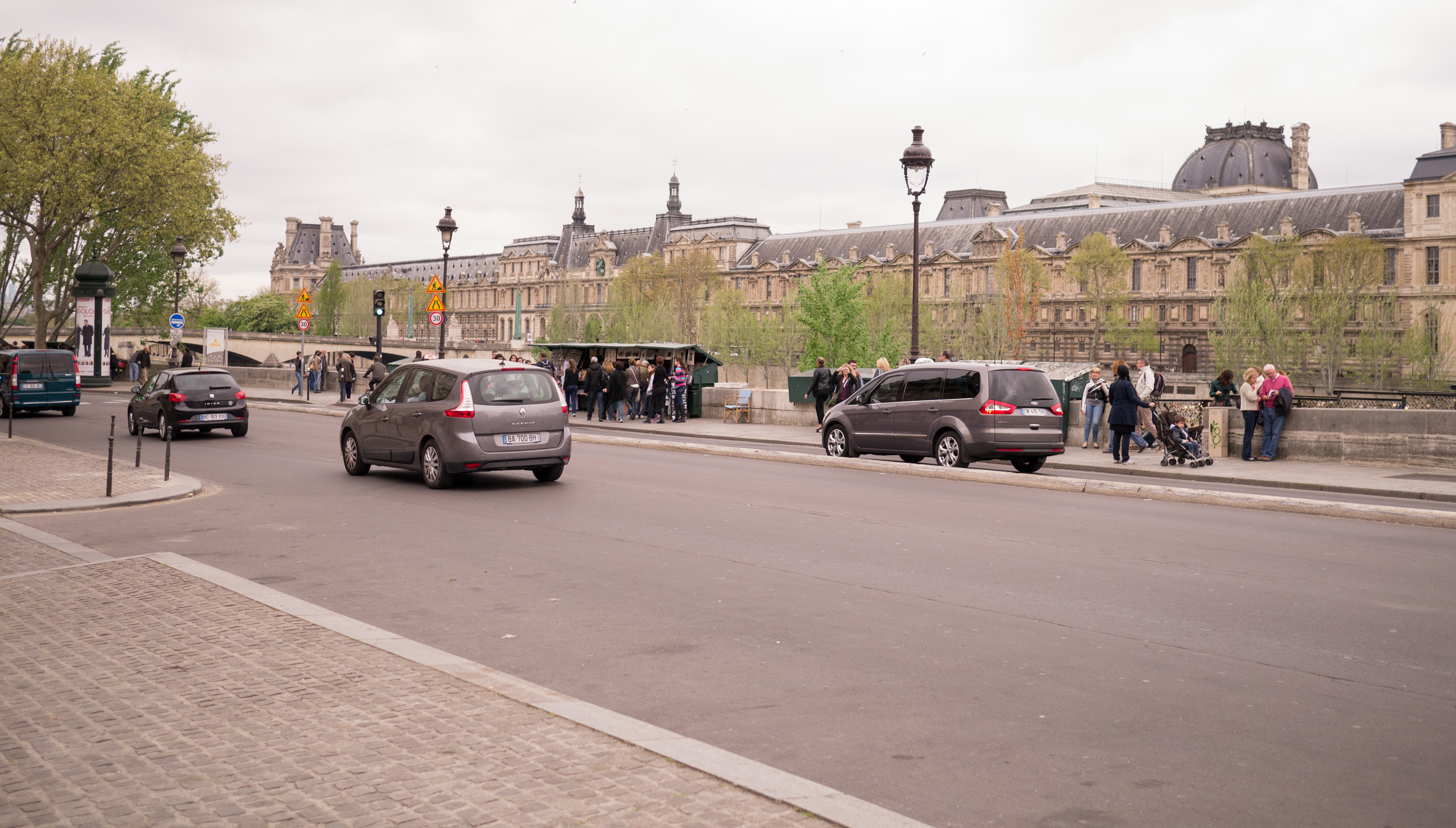 Traffic and bouquinistes at quai Malaquais, VIe arrondissement, Paris, France. Remote view of pont du Carrousel and south facade of the palais du Louvre, Paris April 2014